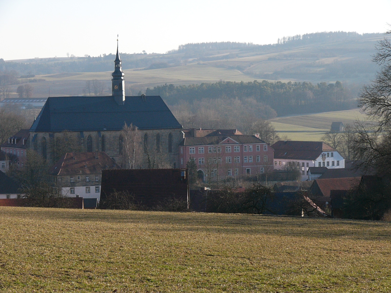 Außenansicht des Klosters